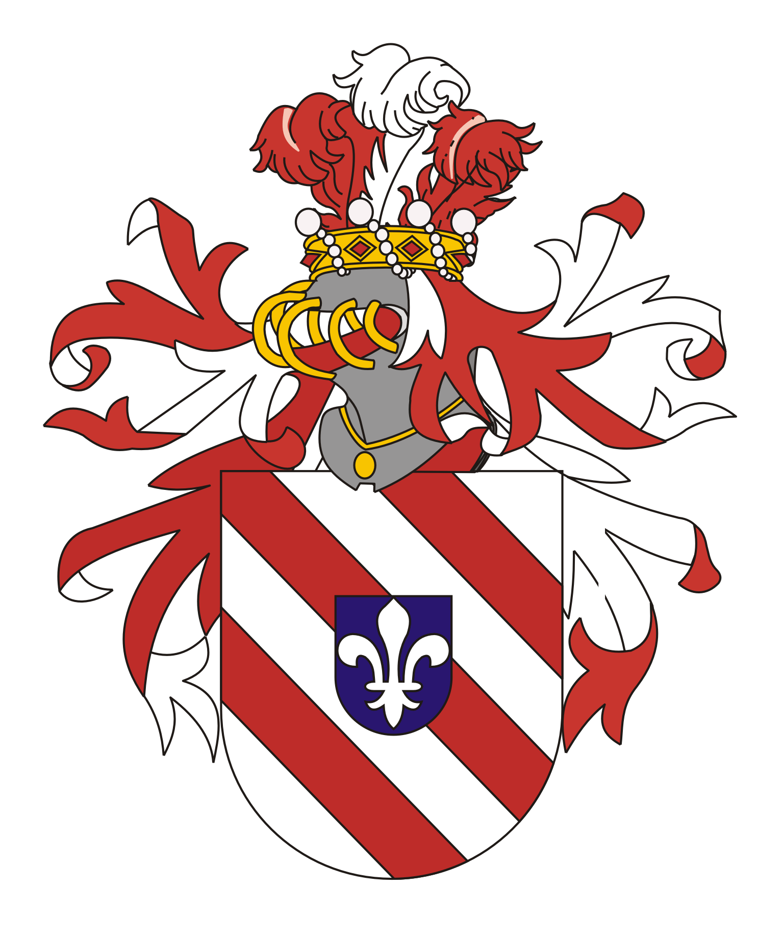 Armoirie de la baronnie de Prado Hermoso